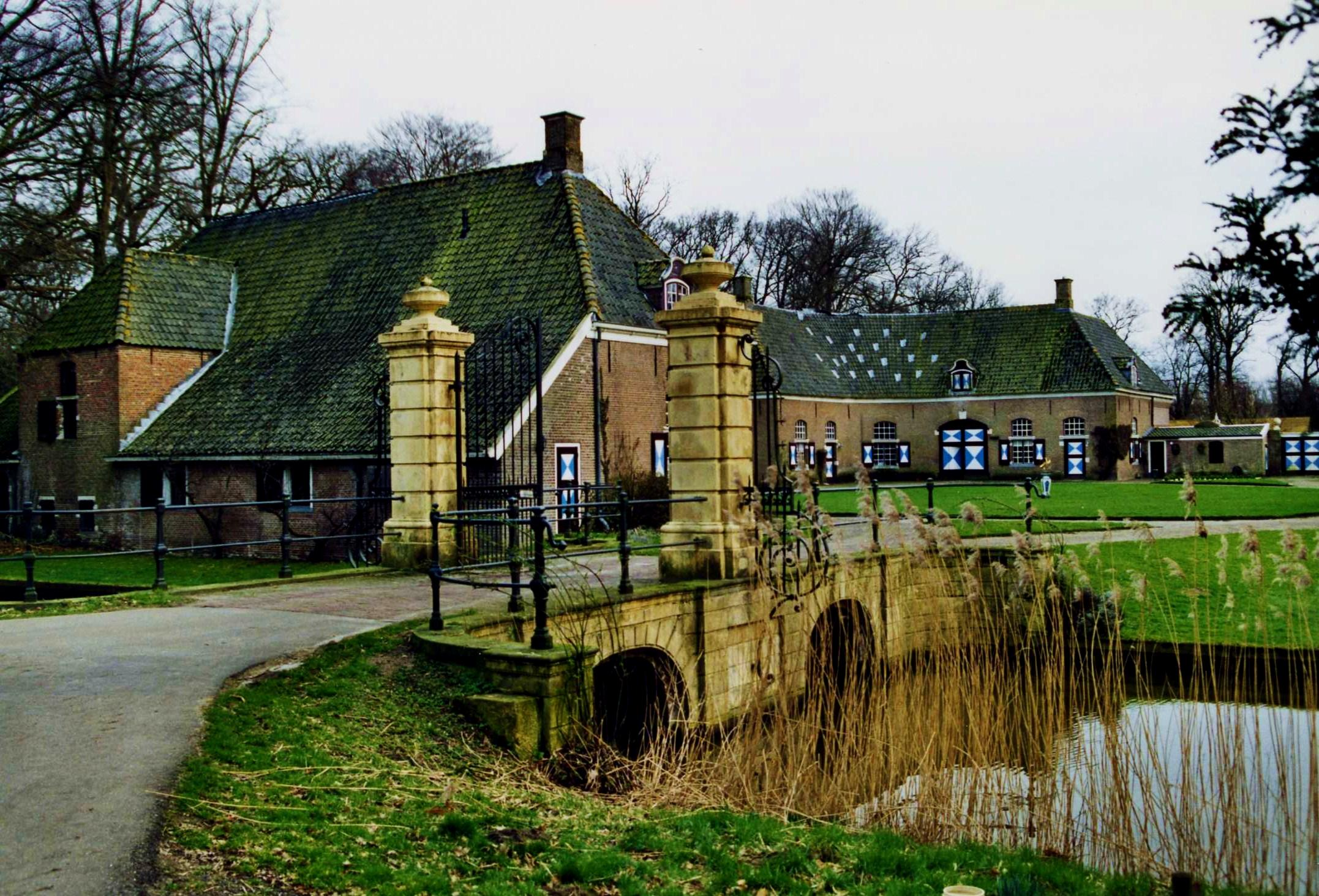 De brug en het hek met de bouwhuizen van havezate Schoonheten te Heeten.